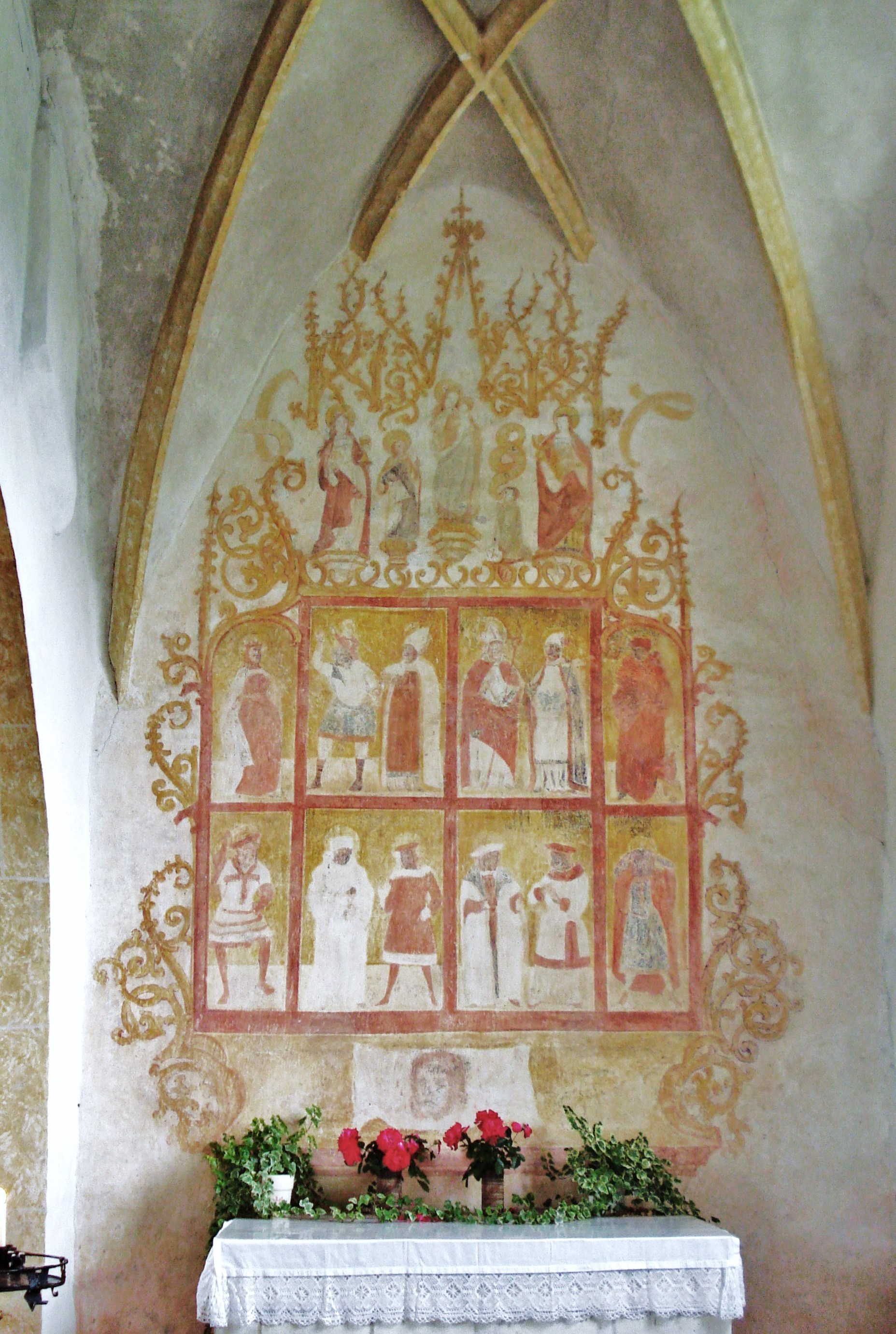 Kath. Filialkirche Westerbuchberg, gemalter gotischer Seitenaltar